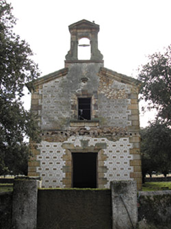 Ruinas de la ermita de Santiago en la Finca "San Fernando", municipio de Matilla de los Caños del Río, provincia de Salamanca. Estado en enero de 2014. Se encuentra donde estuvo el campo de aviación utilizado por las fuerzas militares en 1936. Inaugurada esta capilla en 1956 para conmmemorar el XX aniversario del nombramiento de Franco como Jefe del Estado, hecho que ocurrió en una caseta de madera sita en el mismo lugar. También se erigió un monolito de granito con el escudo (alas) de la Aviación y una inscripción en la piedra de la base. Aparecen ambos en el sello emitido en Diciembre de 1956 y en el No-do nº 7188.